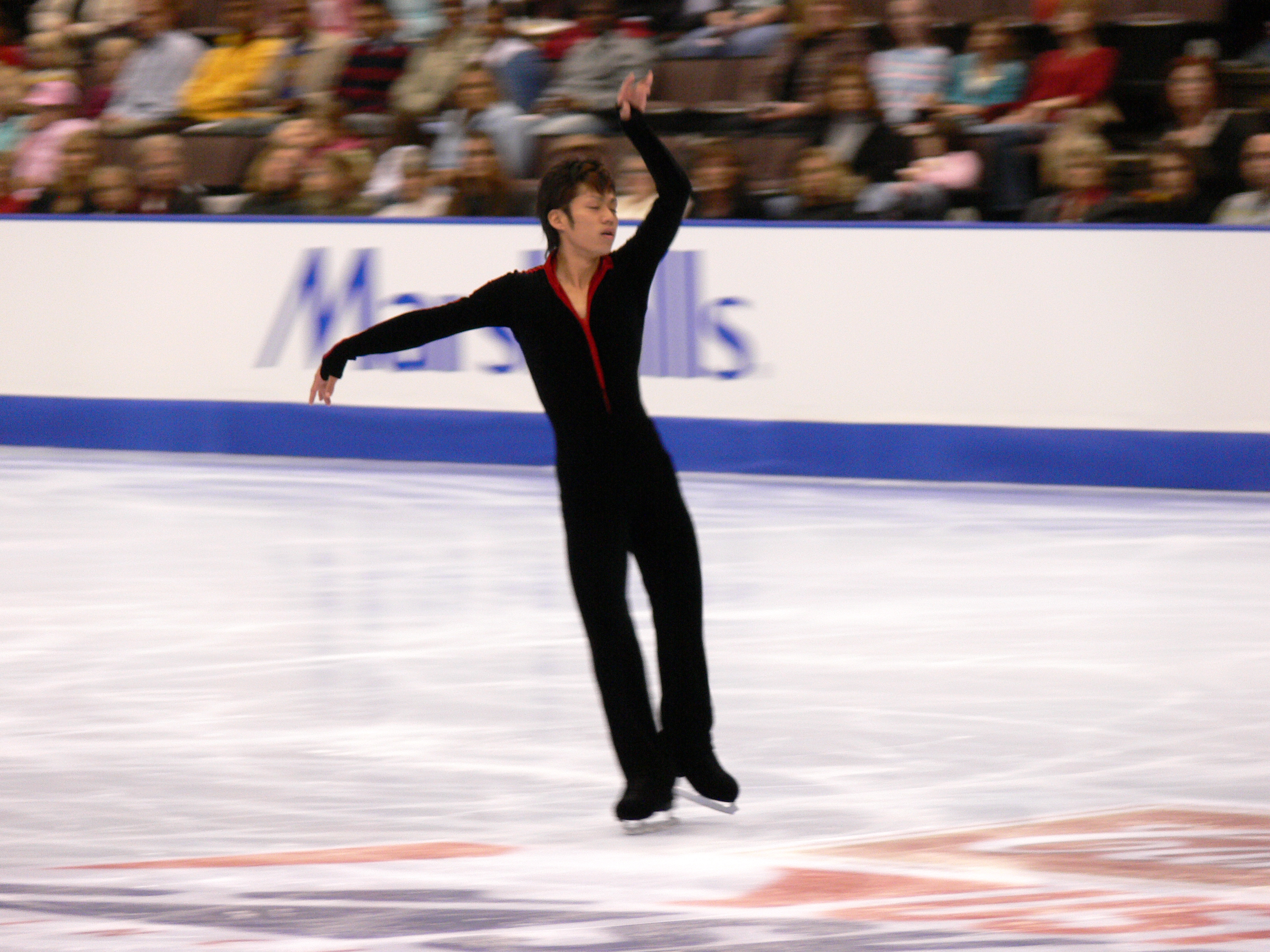 Daisuke Takahashi